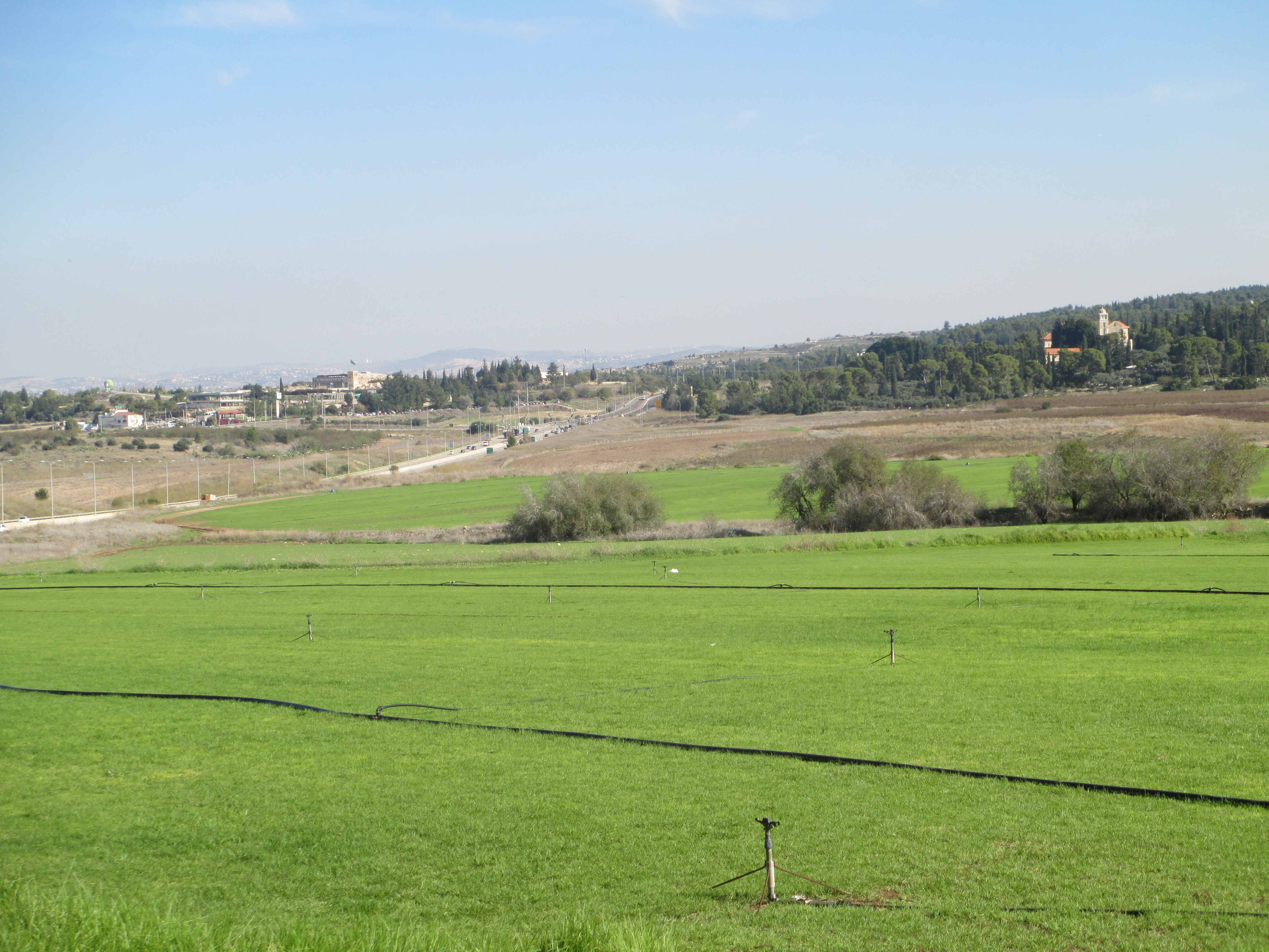 תצפית מאנדרטת אלכסנדרוני בלטרון